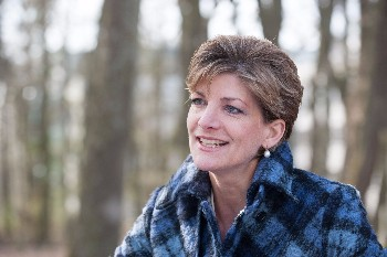 Portät Katharina Starlay